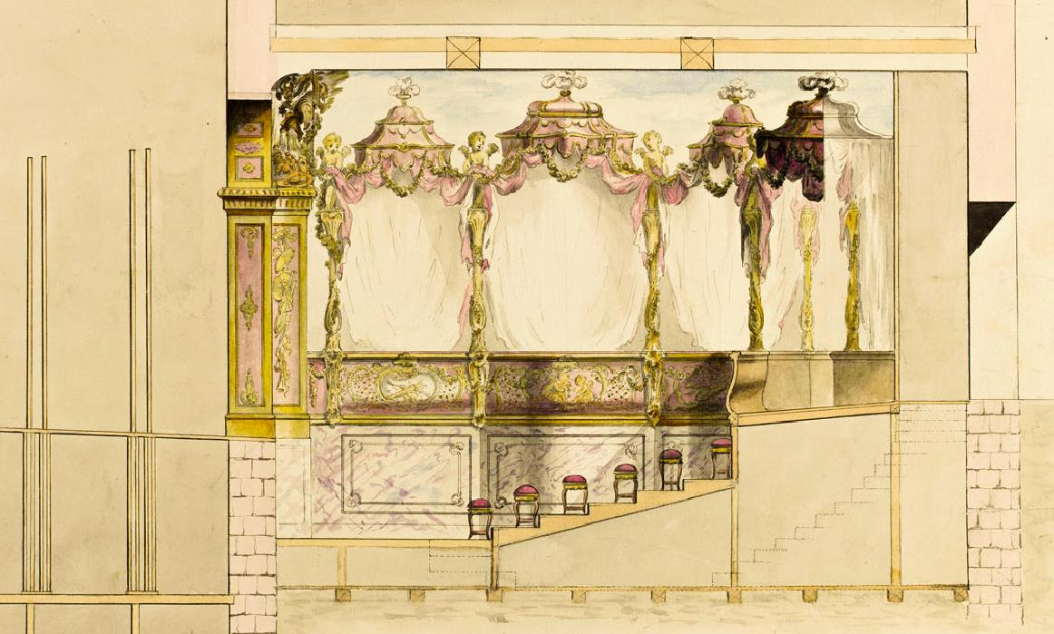 Coupe du théâtre de Bellevue, vers 1752. (identifié de manière inédite par Franck Devedjian, Versalia 2016.)